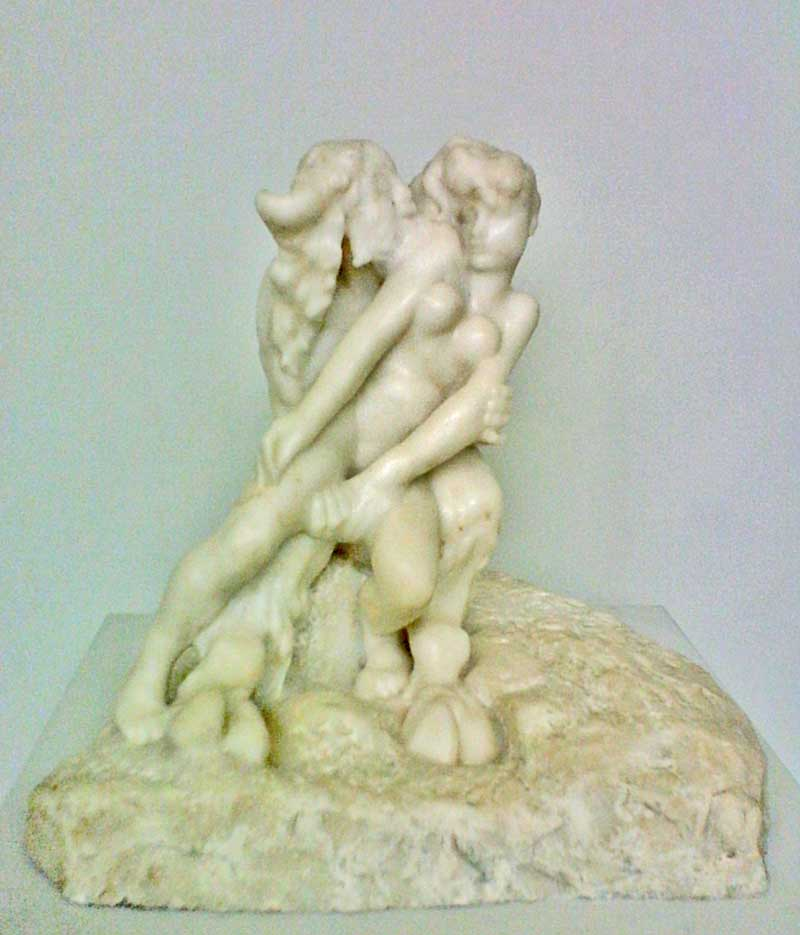 Faun und Nymphe, Marmorstatue von 1885/86, Auguste Rodin, Folkwangmuseum